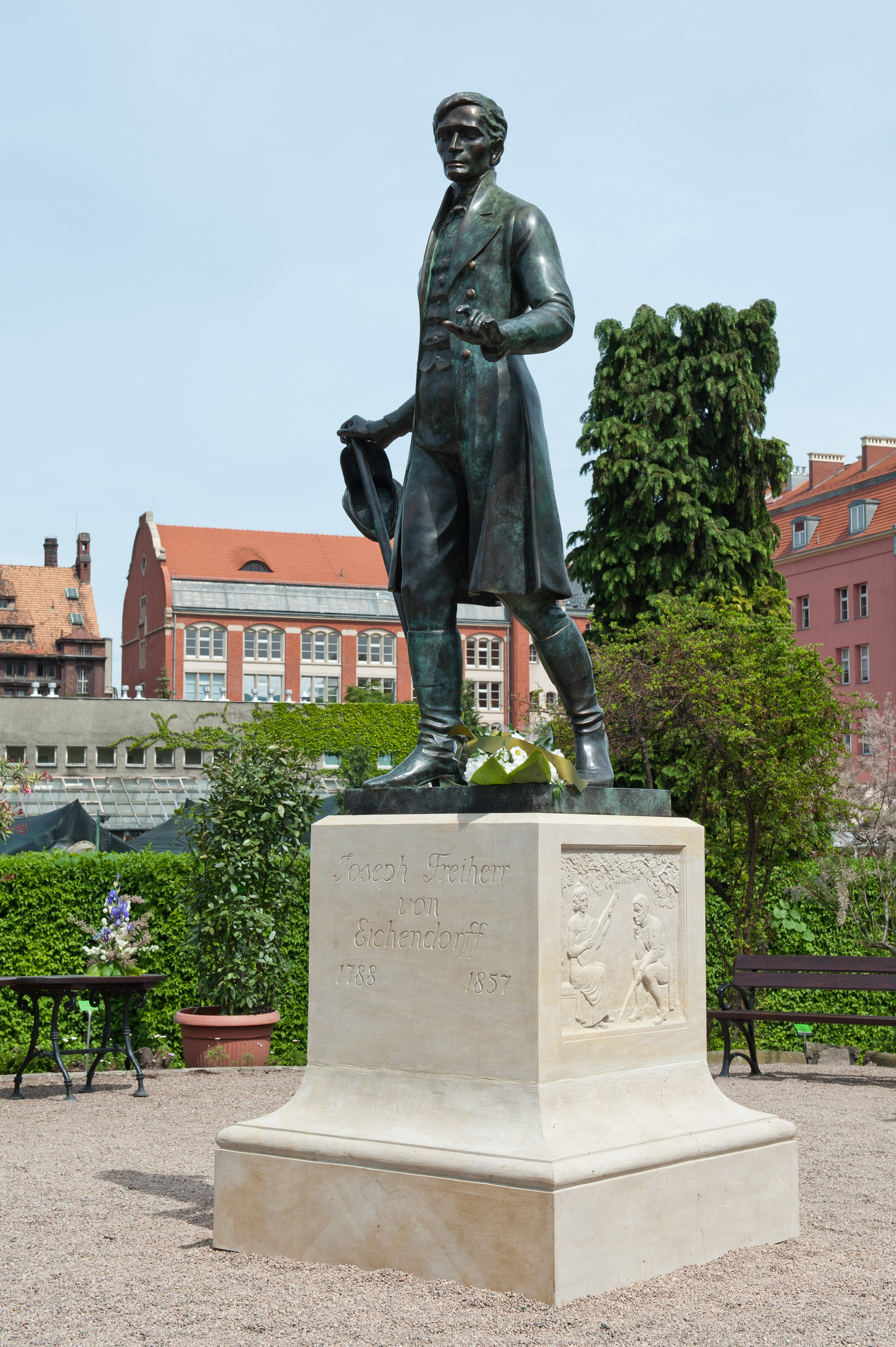 Replika pomnika Jesepha von Eichendorffa w Ogrodzie Botanicznym Uniwersytetu Wrocławskiego. Pomnik odsłonięto 11 maja 2012 r.